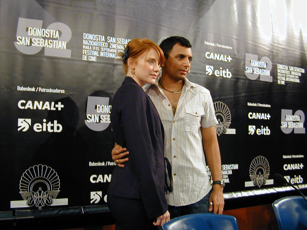 Night Shyamalan et Dallas Howard sur la promotion du Village en Espagne (Festival de San Sebastián)